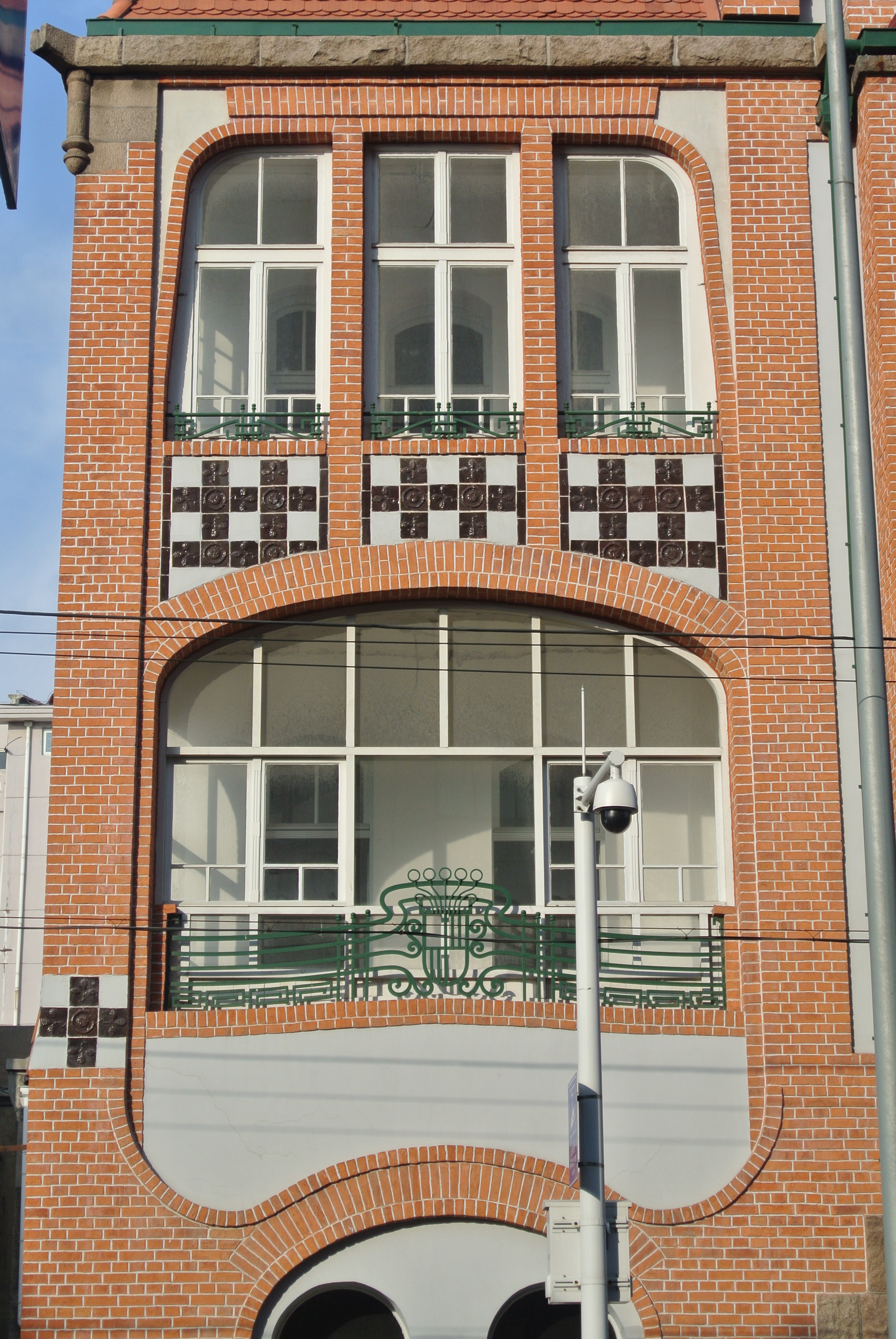 青岛广西路31-33号赉寿药房细节